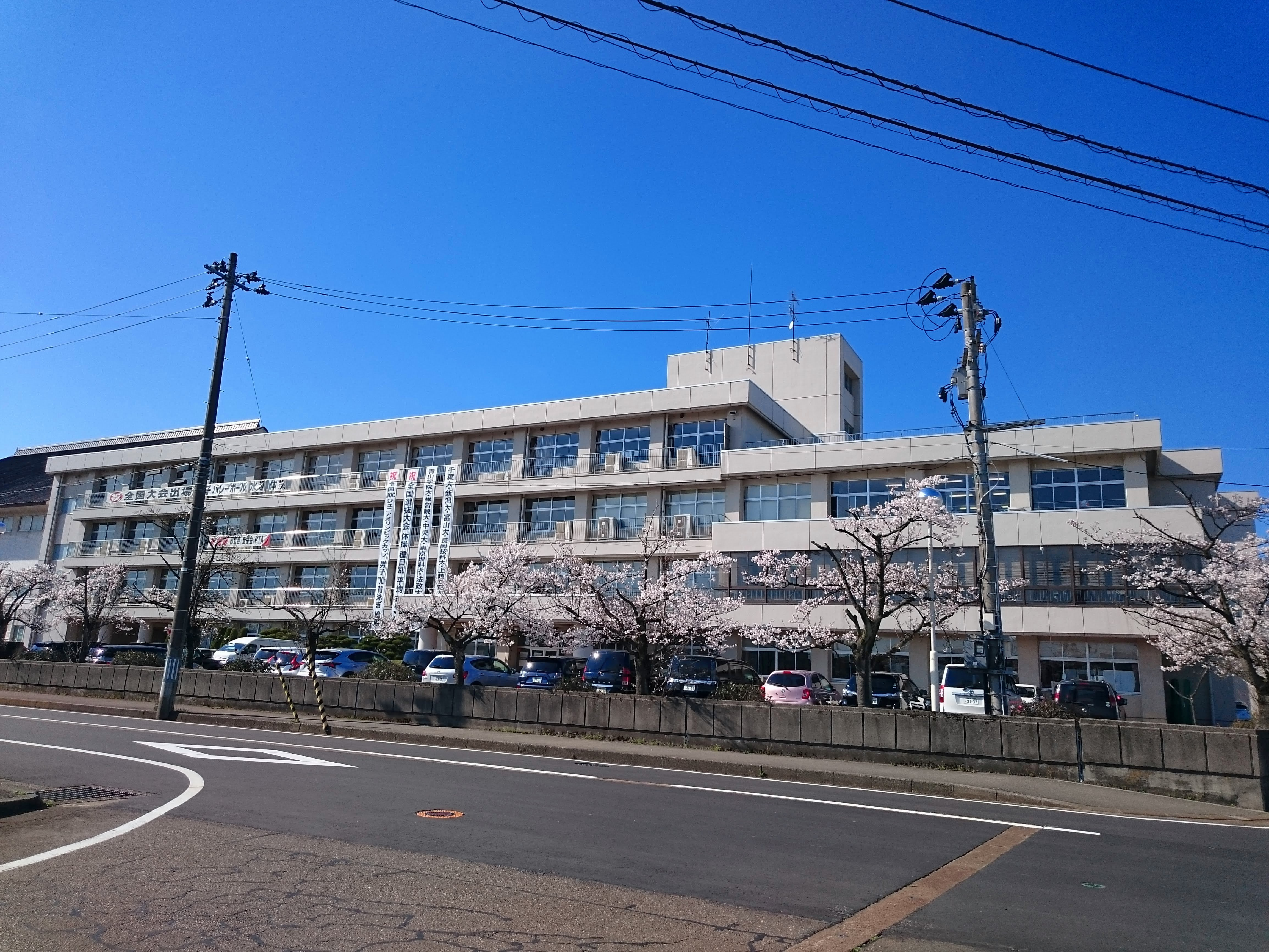 長岡中越高校の校舎外観